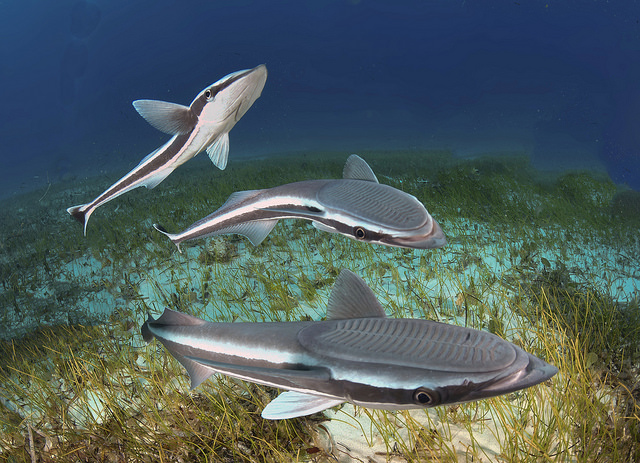 Remoras